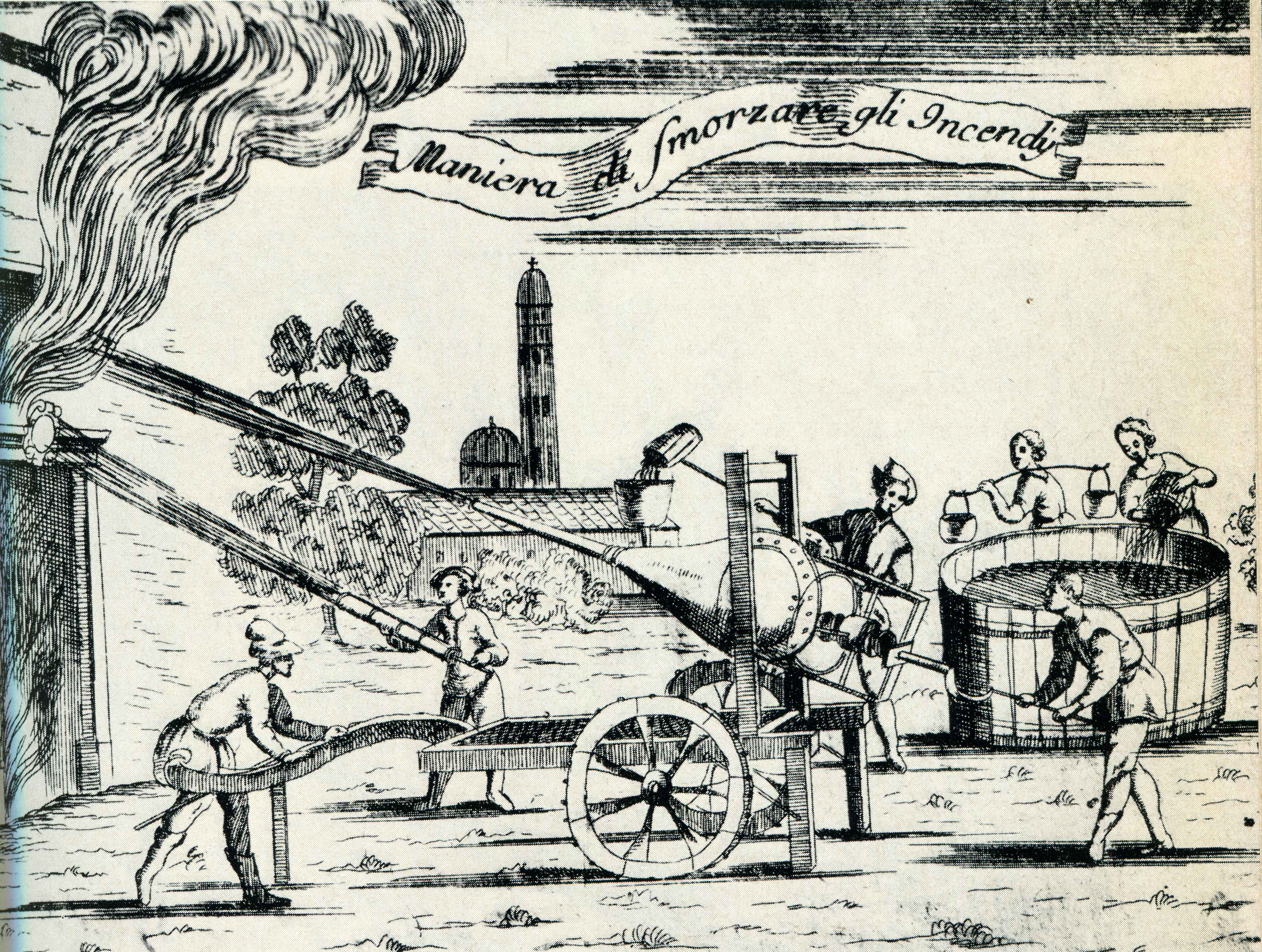 Feuerspritze von Professor Bresson